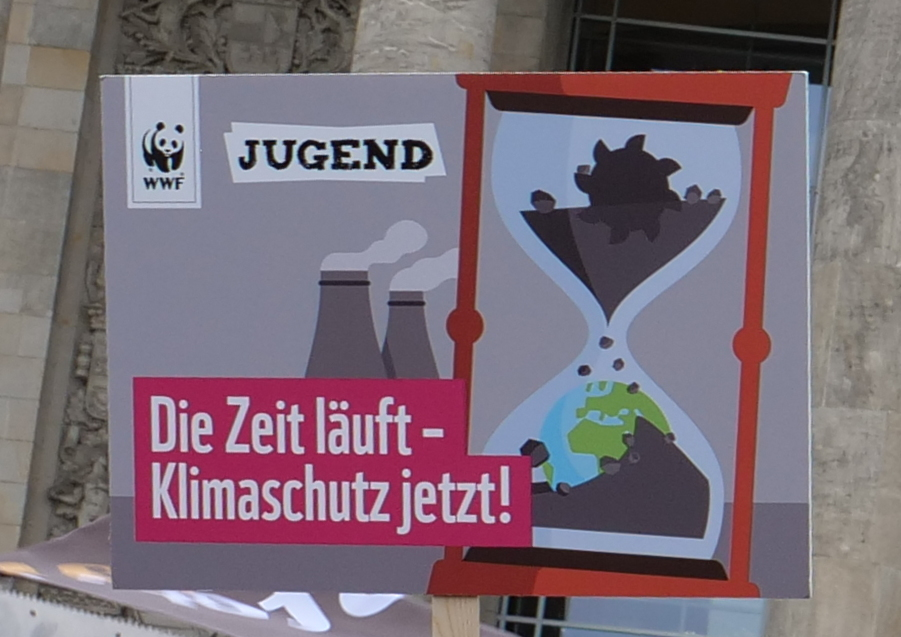 Unter dem Motto "#FridaysForFuture" und "Climate Strike!" streikten insbesondere Schülerinnen und Schüler vor dem Reichstagsgebäude in Berlin.